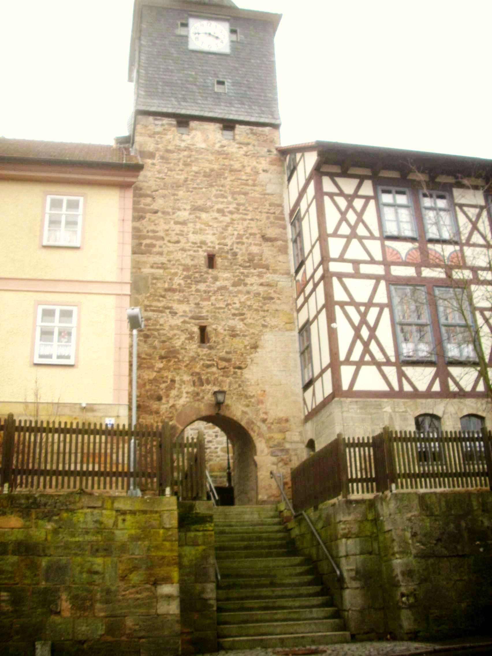 Stepfershausen (Kirchenburg); Kreis Schmalkalden-Meiningen; Bundesland (und Freistaat) Thüringen; Deutschland; Erbaut im späten 14. Jh. in einem Burgstall; spätere Veränderungen; Bemerkenswert: Ehemalige „Gaden-Kirchenburg“, Gaden ausgebaut zur Ortsseite erhalten; Torturm mit 3 Geschossen; massiver Kirchturm (Chorturm); Reste der festen Kirchhofmauer.